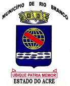 Brasão de Rio Branco, Acre, Brasil - Coat of Arms of Rio Branco, Acre, Brazil